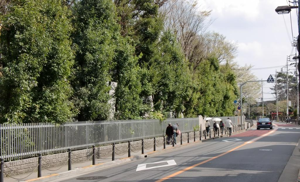 赤堤通り